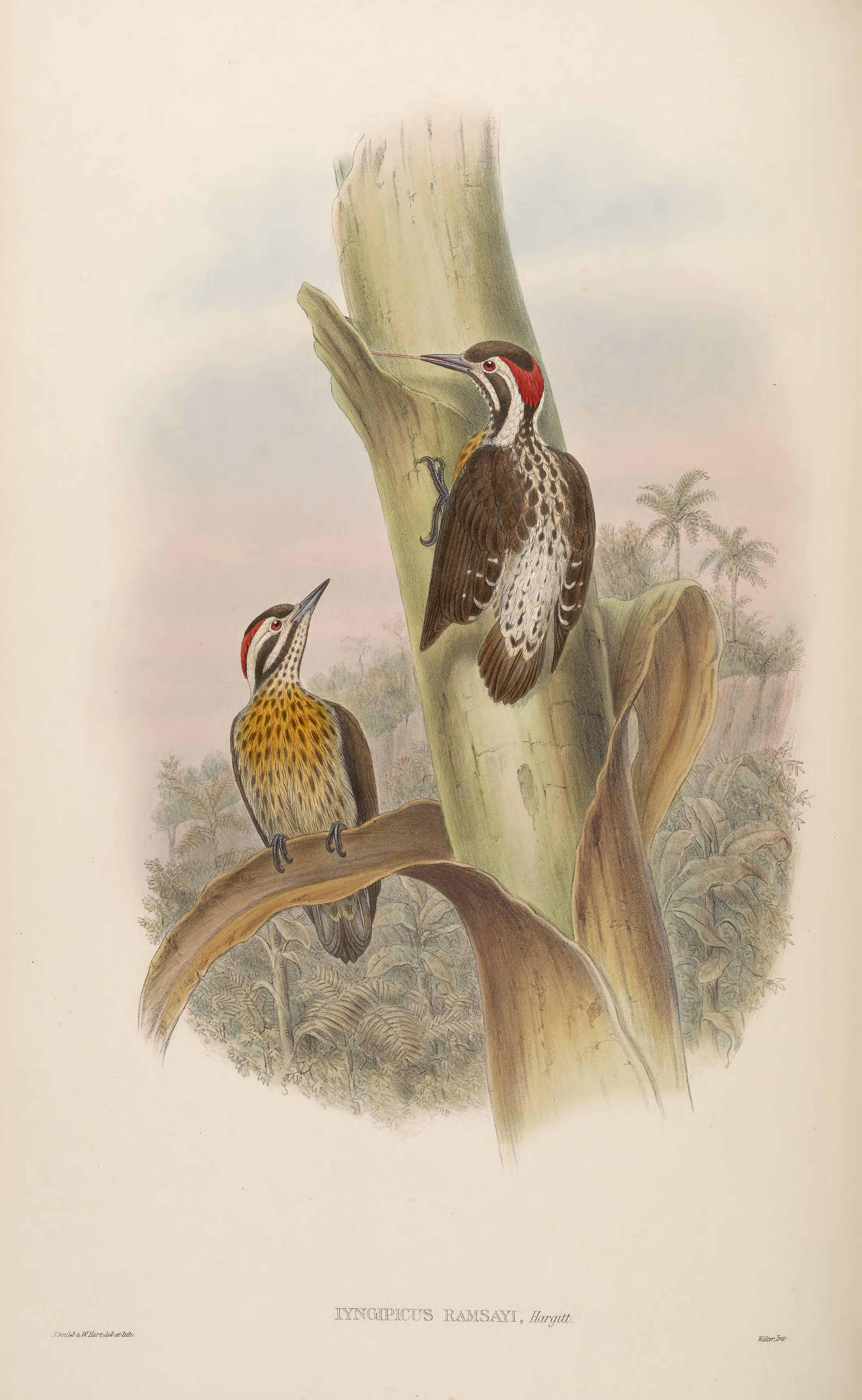 Iyngipicus ramsayi = Dendrocopos ramsayi ramsayi[1]